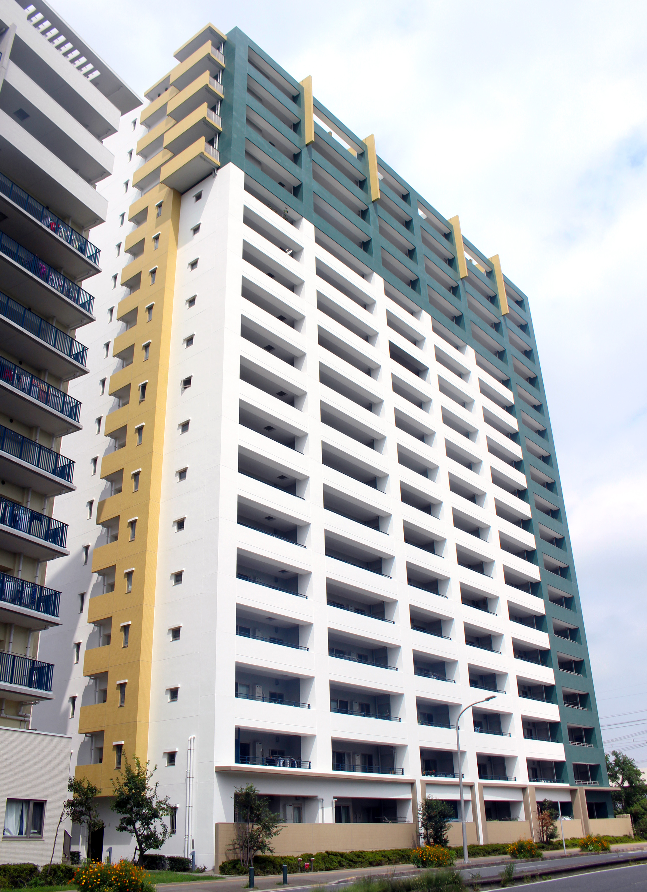 Patios Grand Axiv3番館